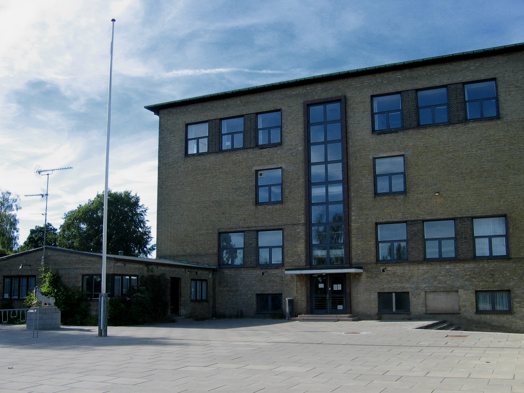 Tegnet af arkitekt Frederik Wagner. Læs mere her: Bakkegårdsskolen